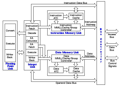 Diagrama de blocs d'un processador 68040